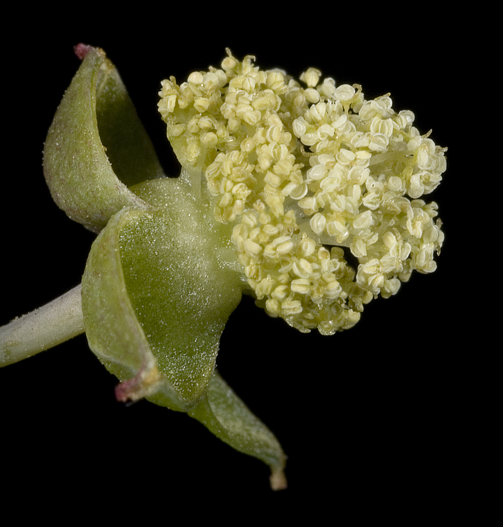 KRT3205